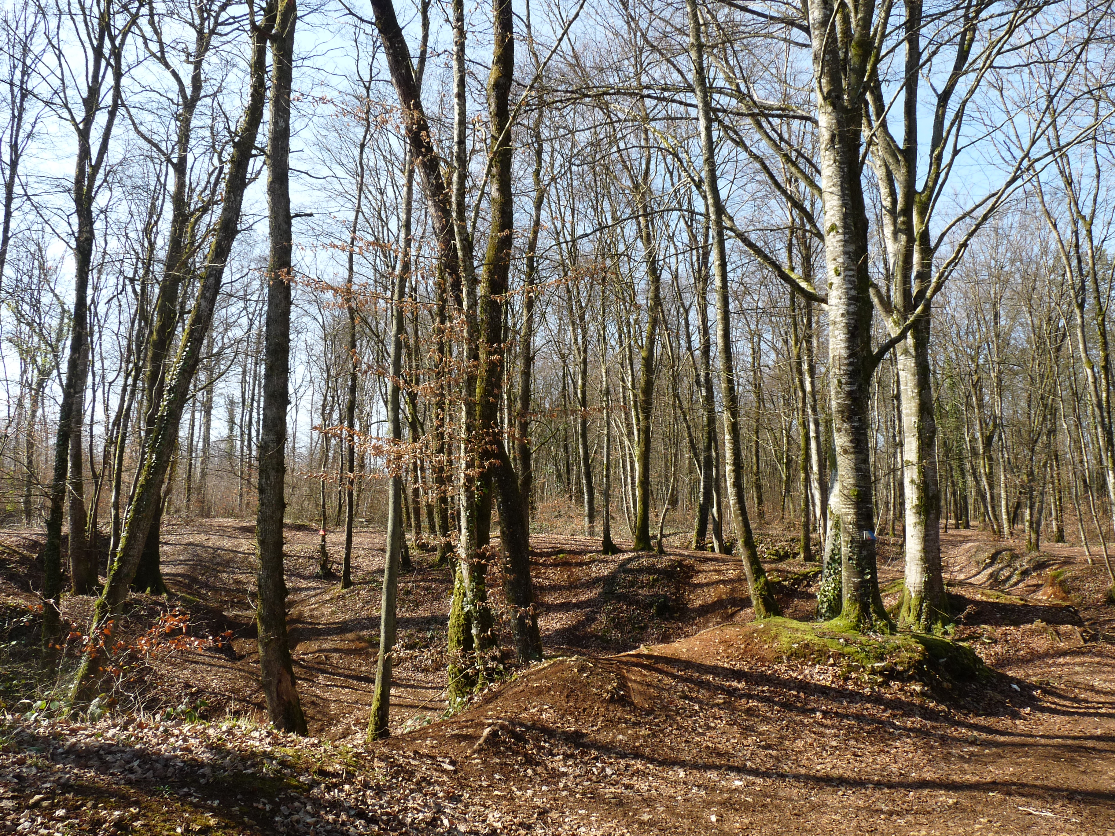 Forêt communale de Montreuil-sur-Thonnance (Haute-Marne)